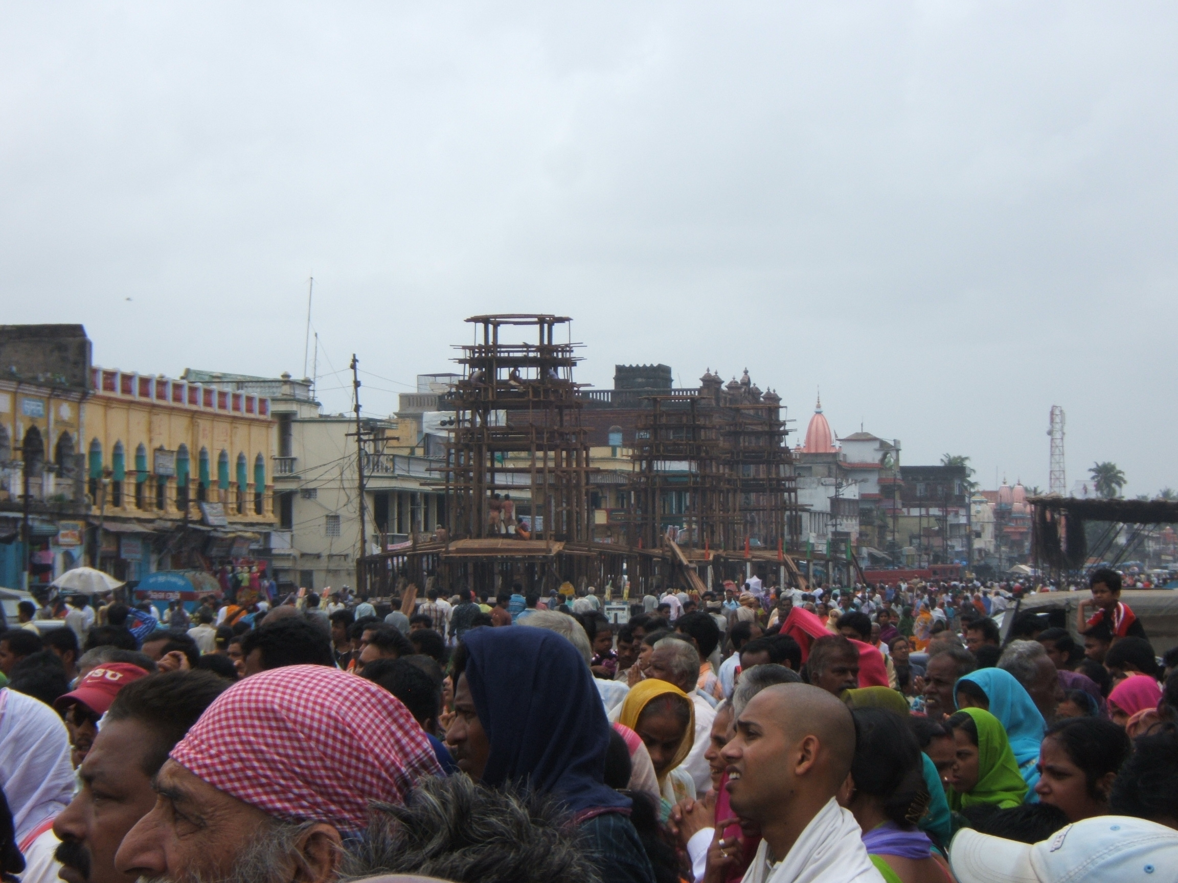 Snana Purnima Jagganatha Puri